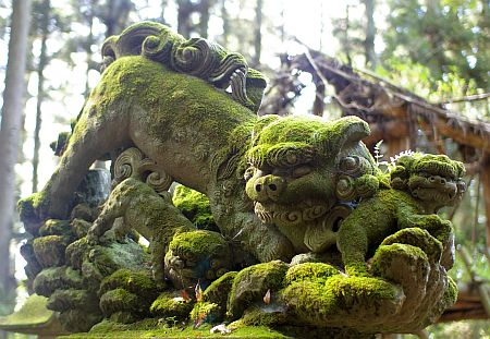 鐘鋳神社の狛犬。小林和平・作。昭和9年。